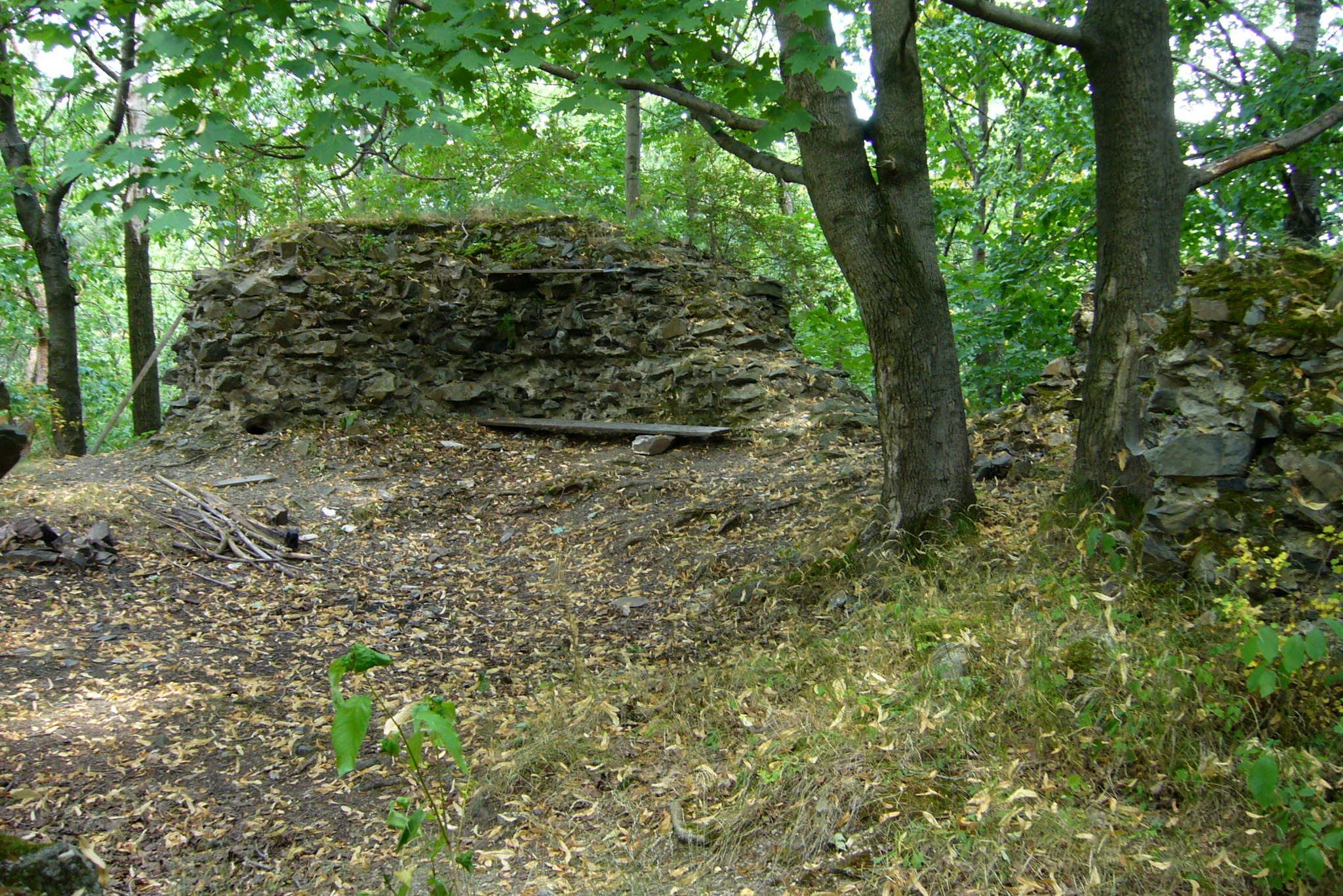 Interiér věže